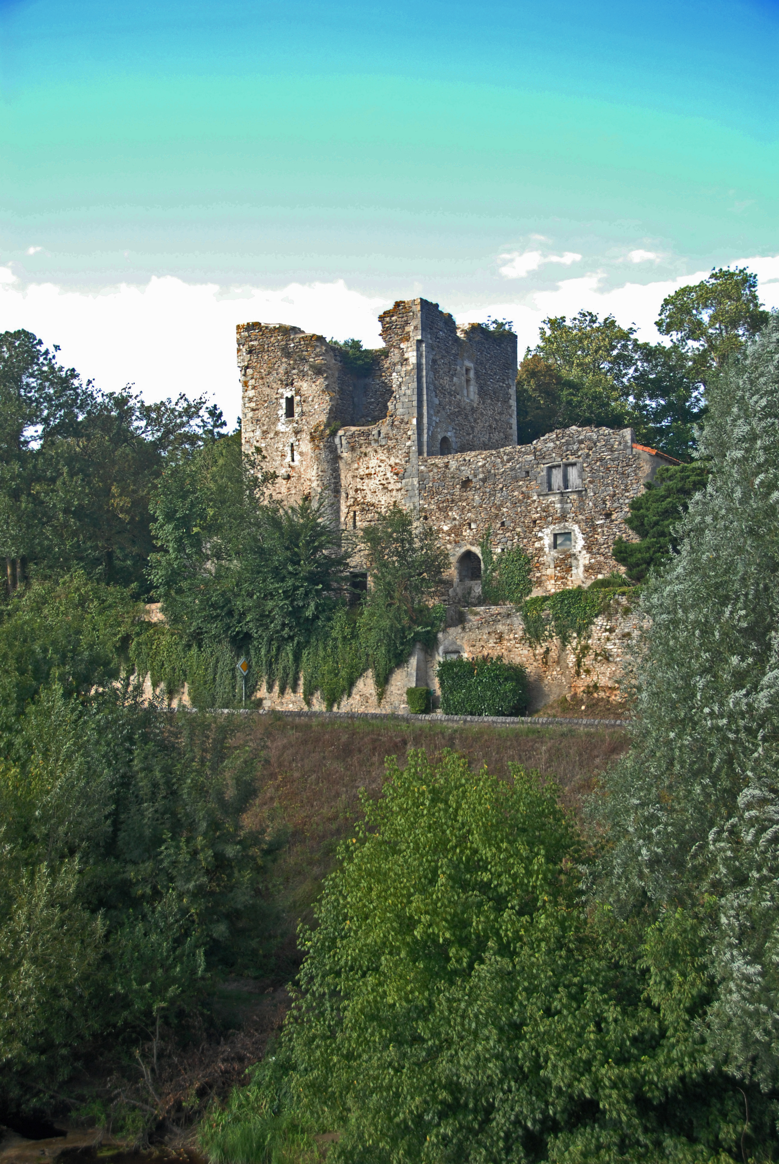 Civaux, Château La Tour-aux-Cognos